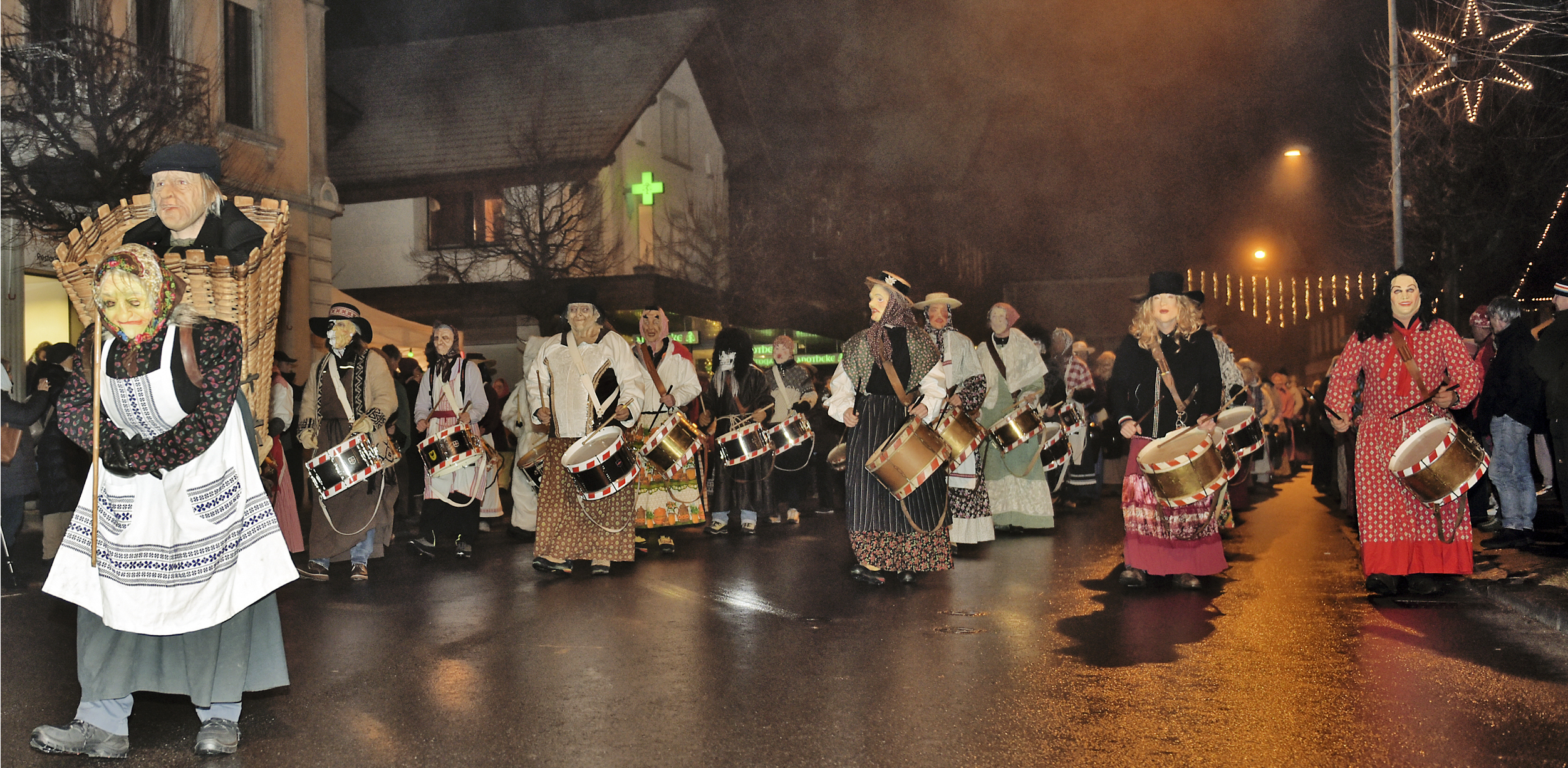 Theo van Dommelen